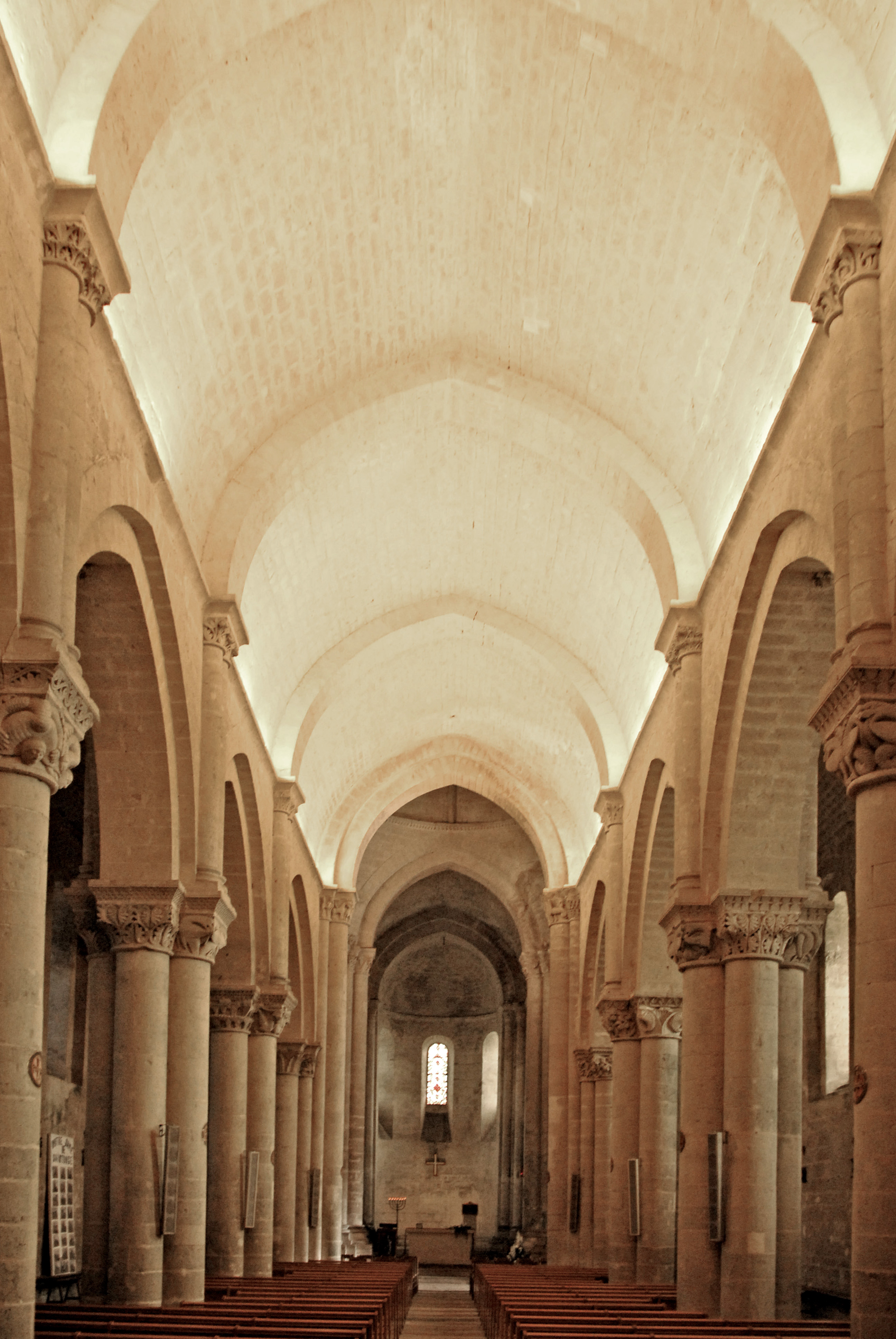 St.-Pierre Aulnay, Mittelschiff